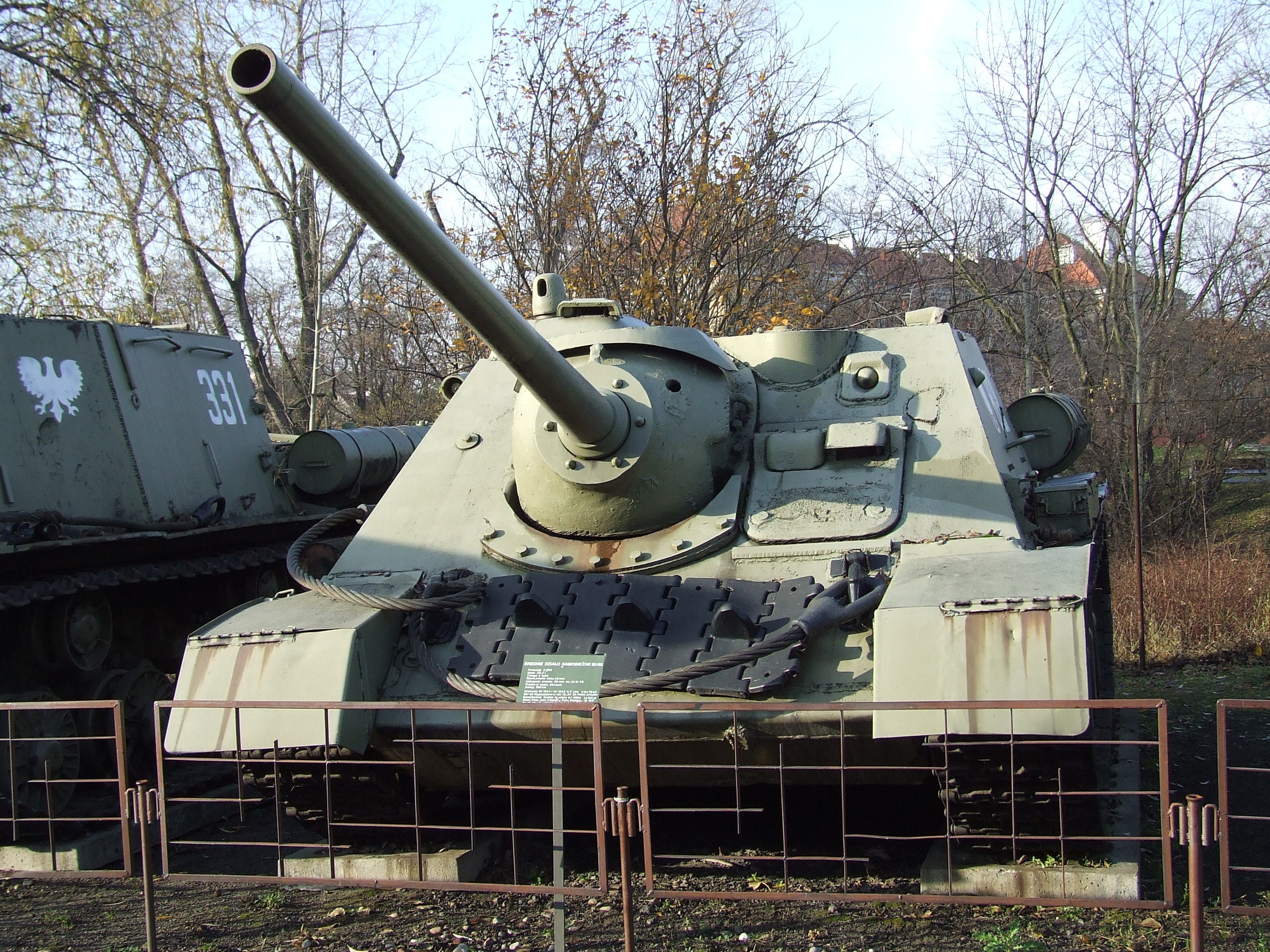 SU-85, średnie działo samobieżne, III.1944-IV.1945